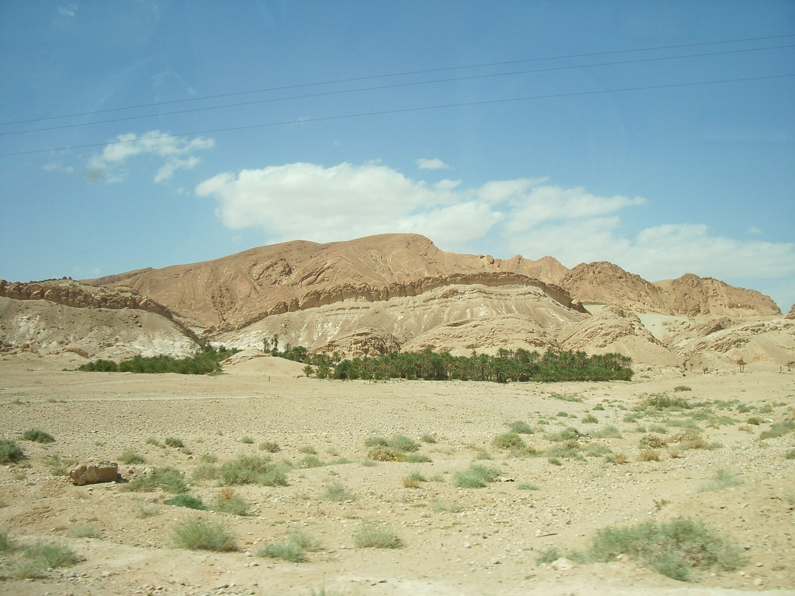 Muntanyes de la frontera algeriana, a la governació de Tozeur